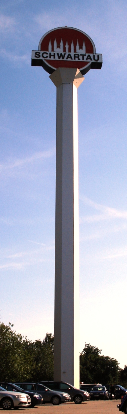 Der Schwartau Werbeturm in Bad Schwartau